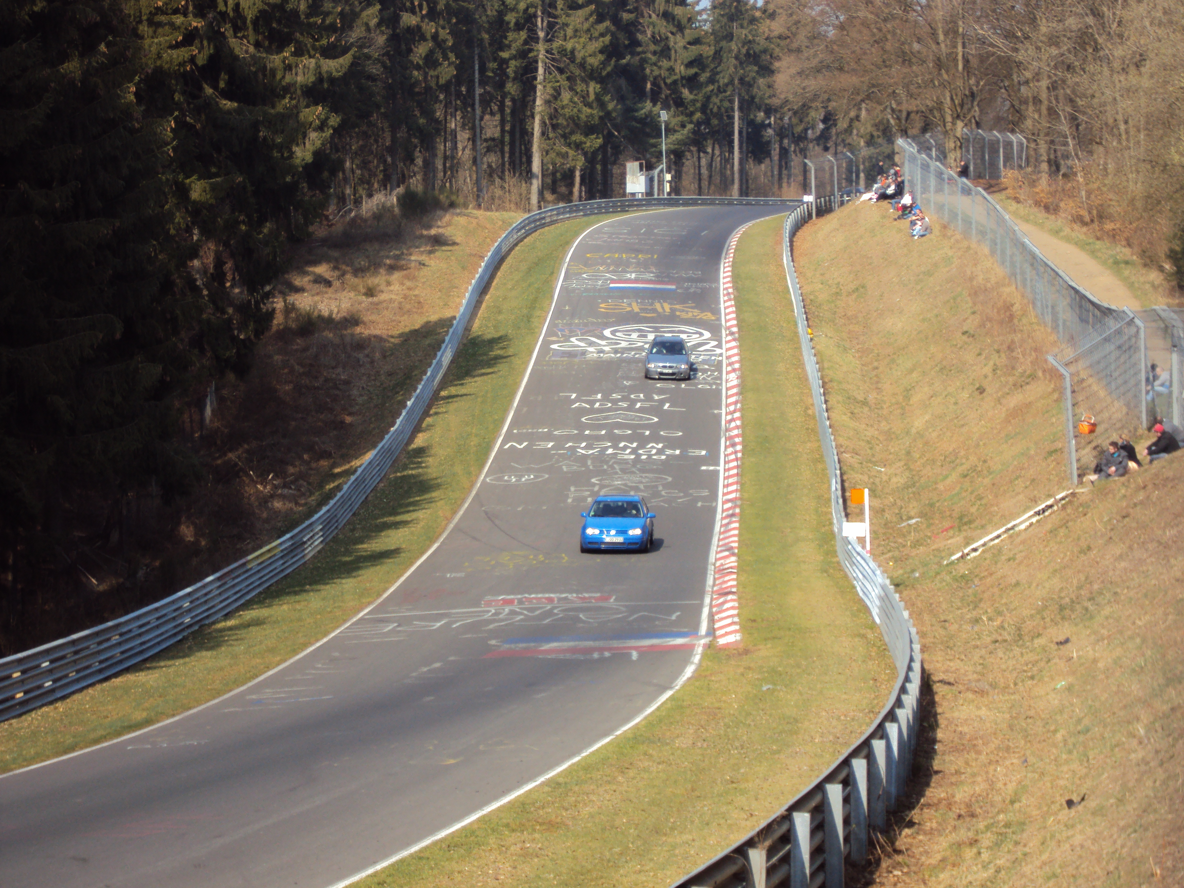 Großer Sprunghügel im Streckenabschnitt Pflanzgarten der Nürburgring Nordschleife.